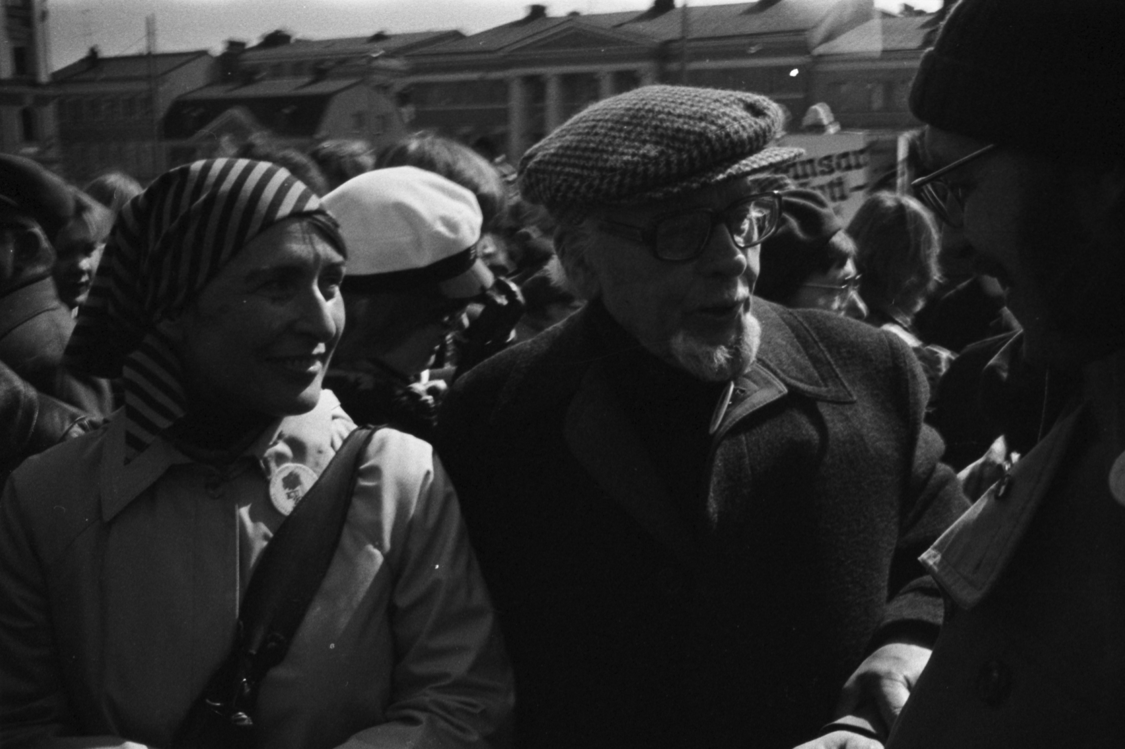 Kirjailija Brita Polttila (1920–2008) ja runoilija Arvo Turtiainen (1904–1980) Senaatintorilla vappupäivänä työläisten vappujuhlan aikaan.